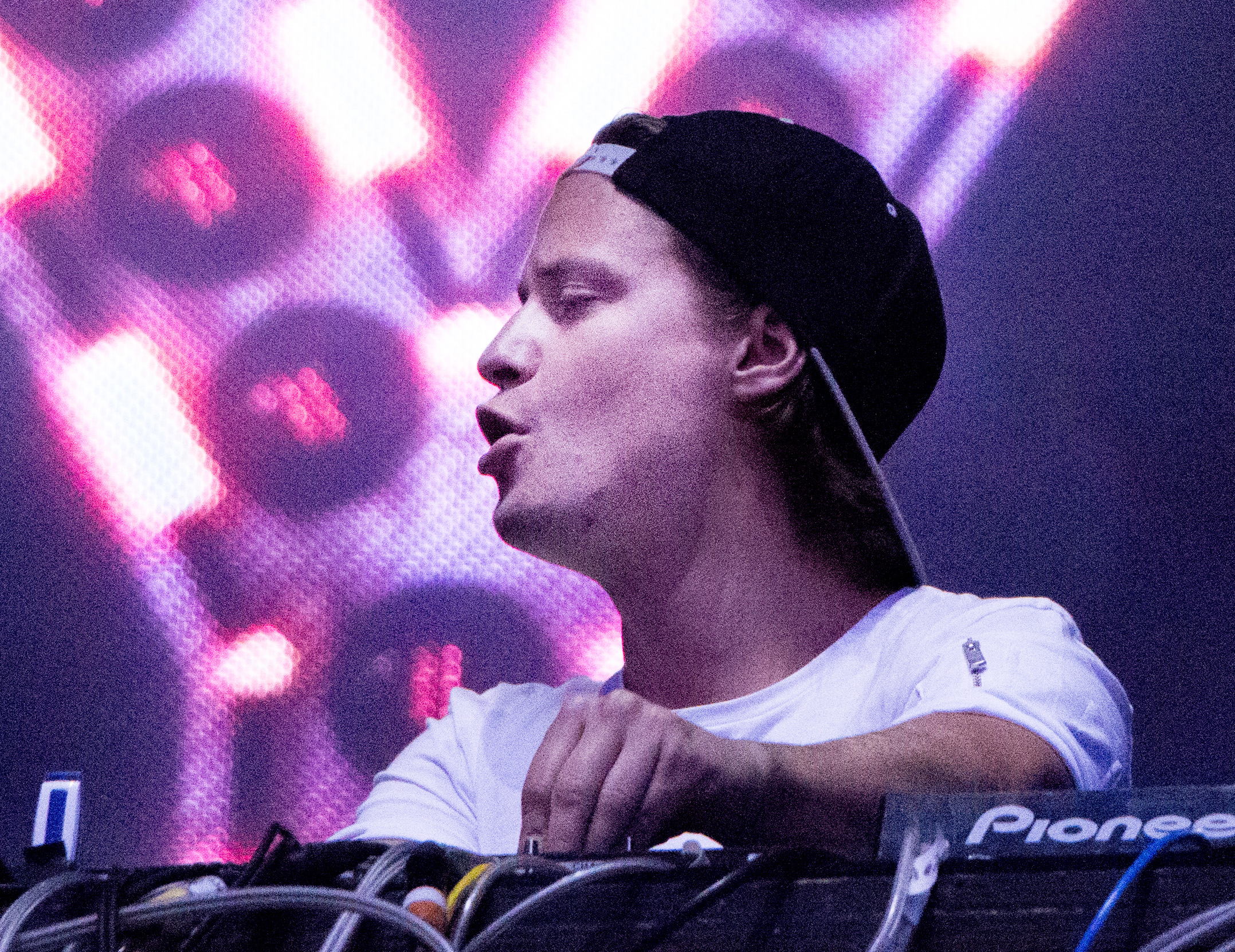 Kygo in VELD 2016